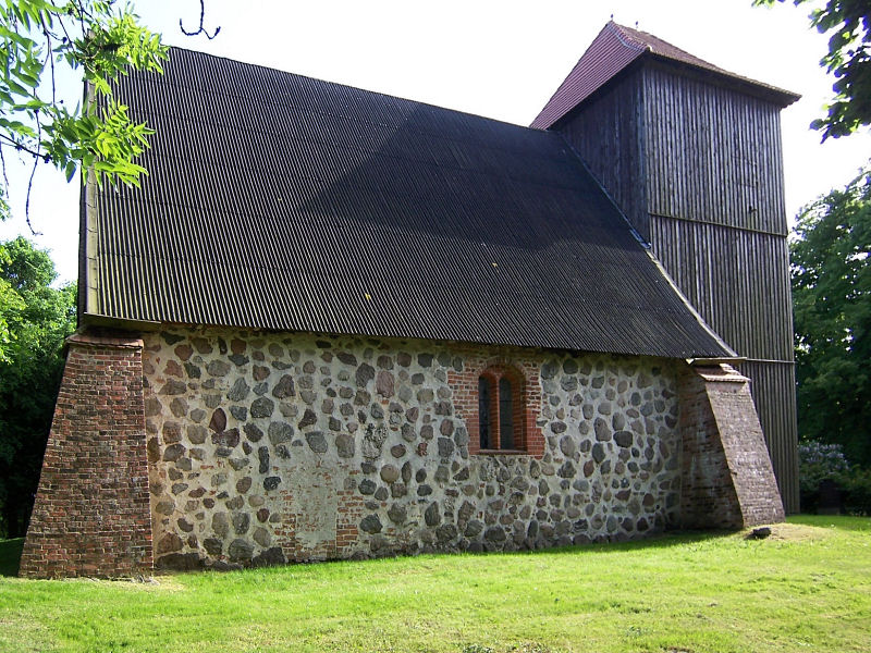 Kirche in Ruest, Landkreis Parchim